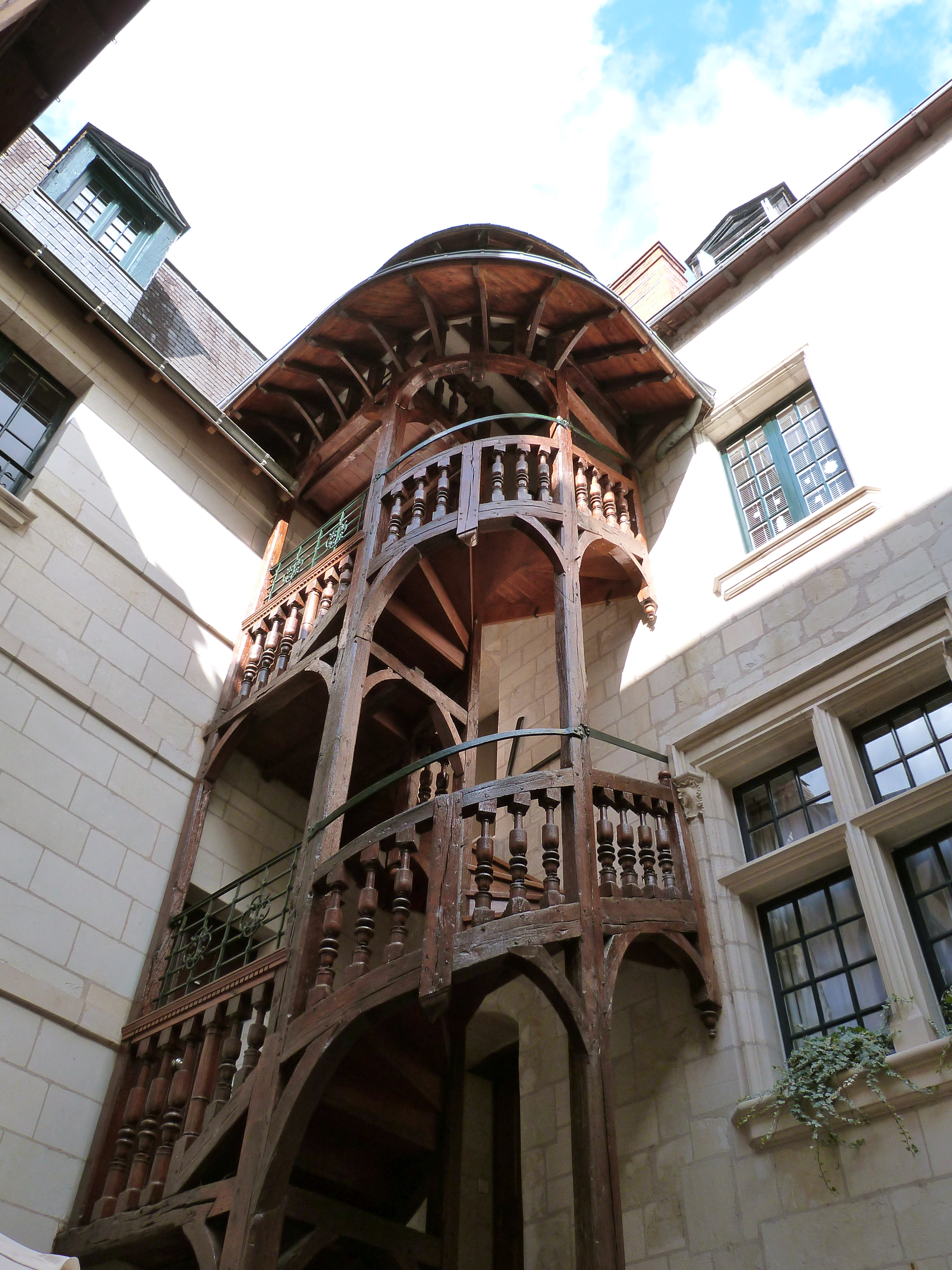 Hôtellerie du Panier Fleury, 2 rue du Panier-Fleuri (Inscrit, 1946) .